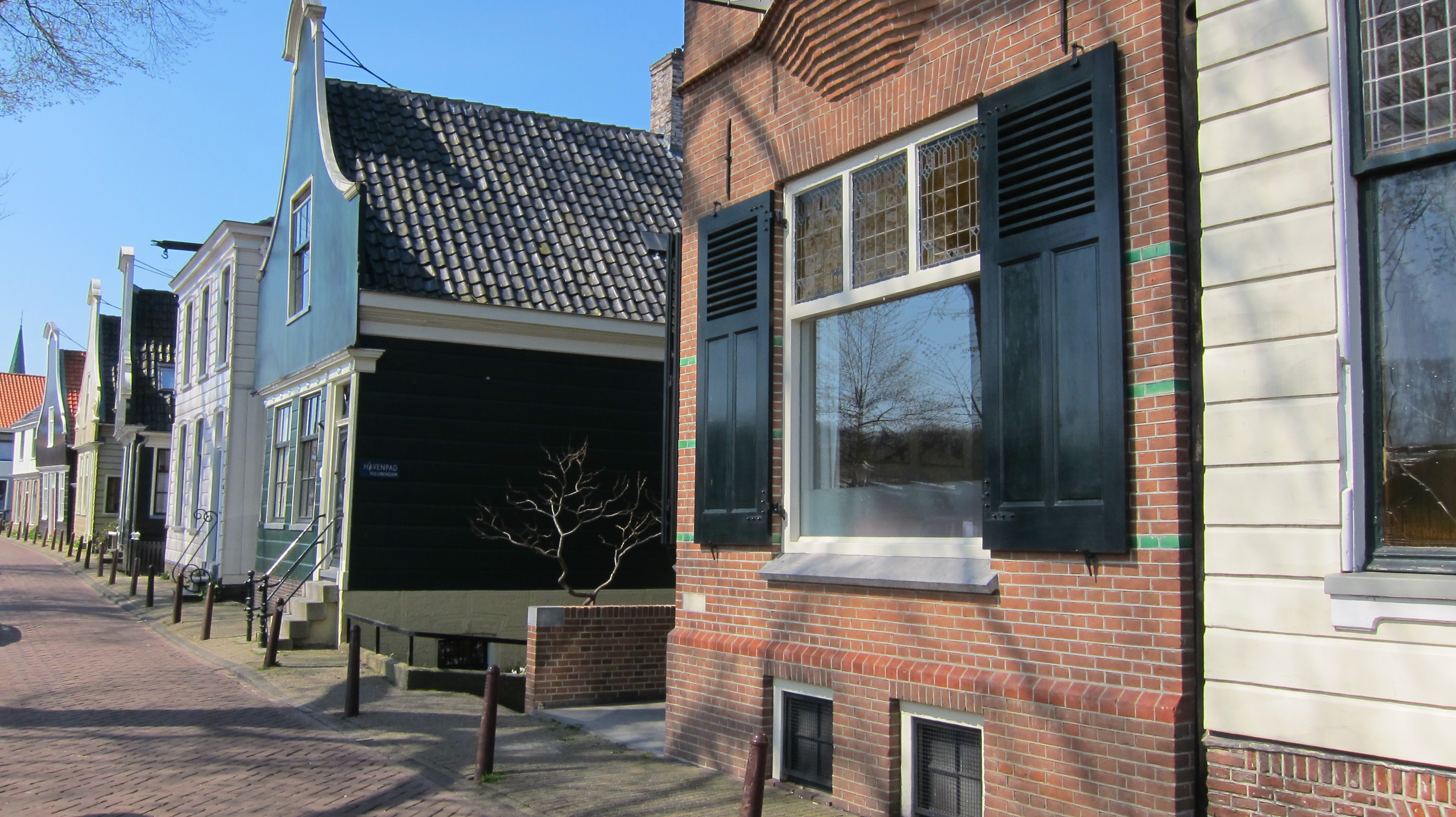 Schellingwoude